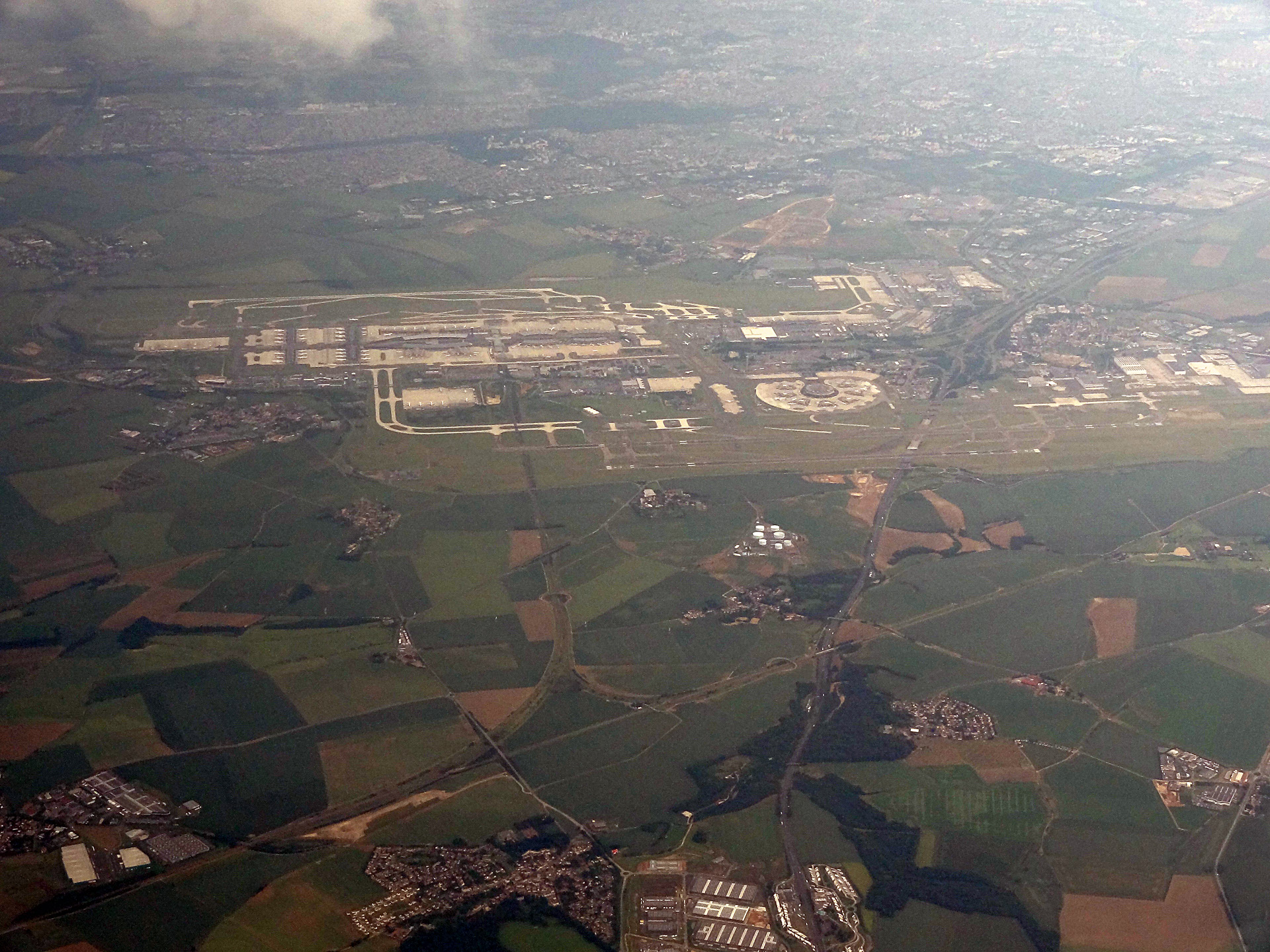 Vue aérienne de Villeron et Vémars (Val-d'Oise), France. Vue en direction du sud.